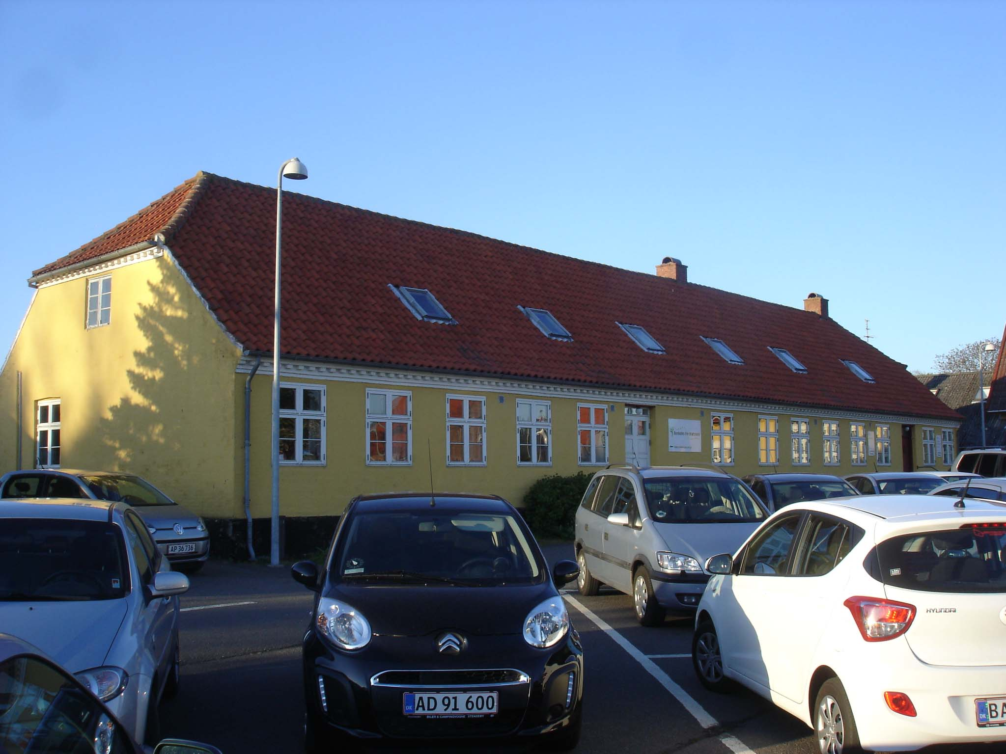 Bornholms Frie Idrætsskole i Nyker